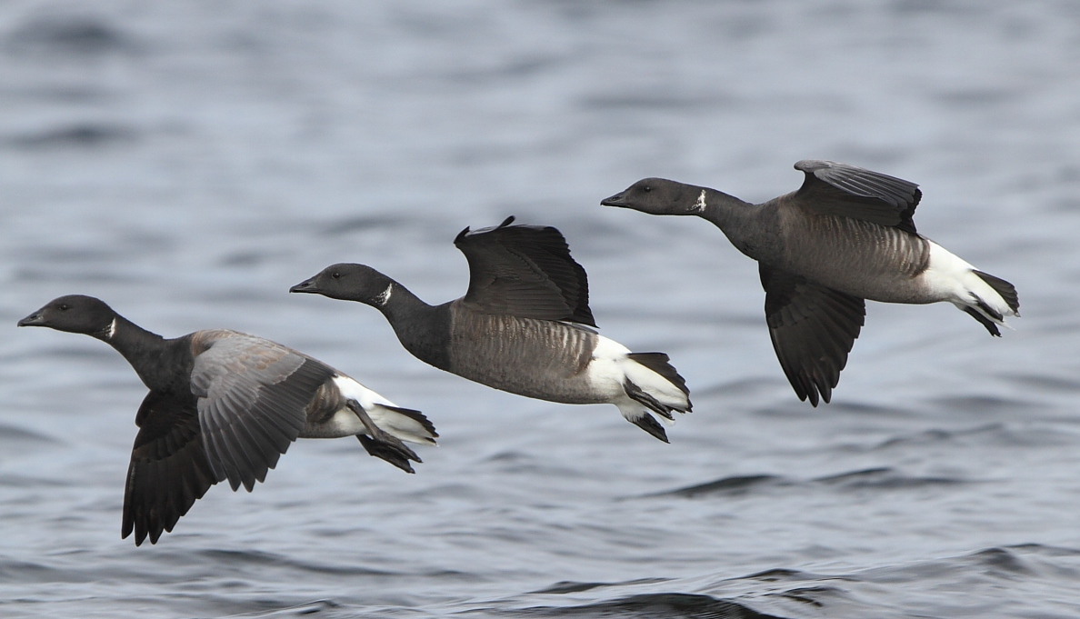 From Lista, Norway